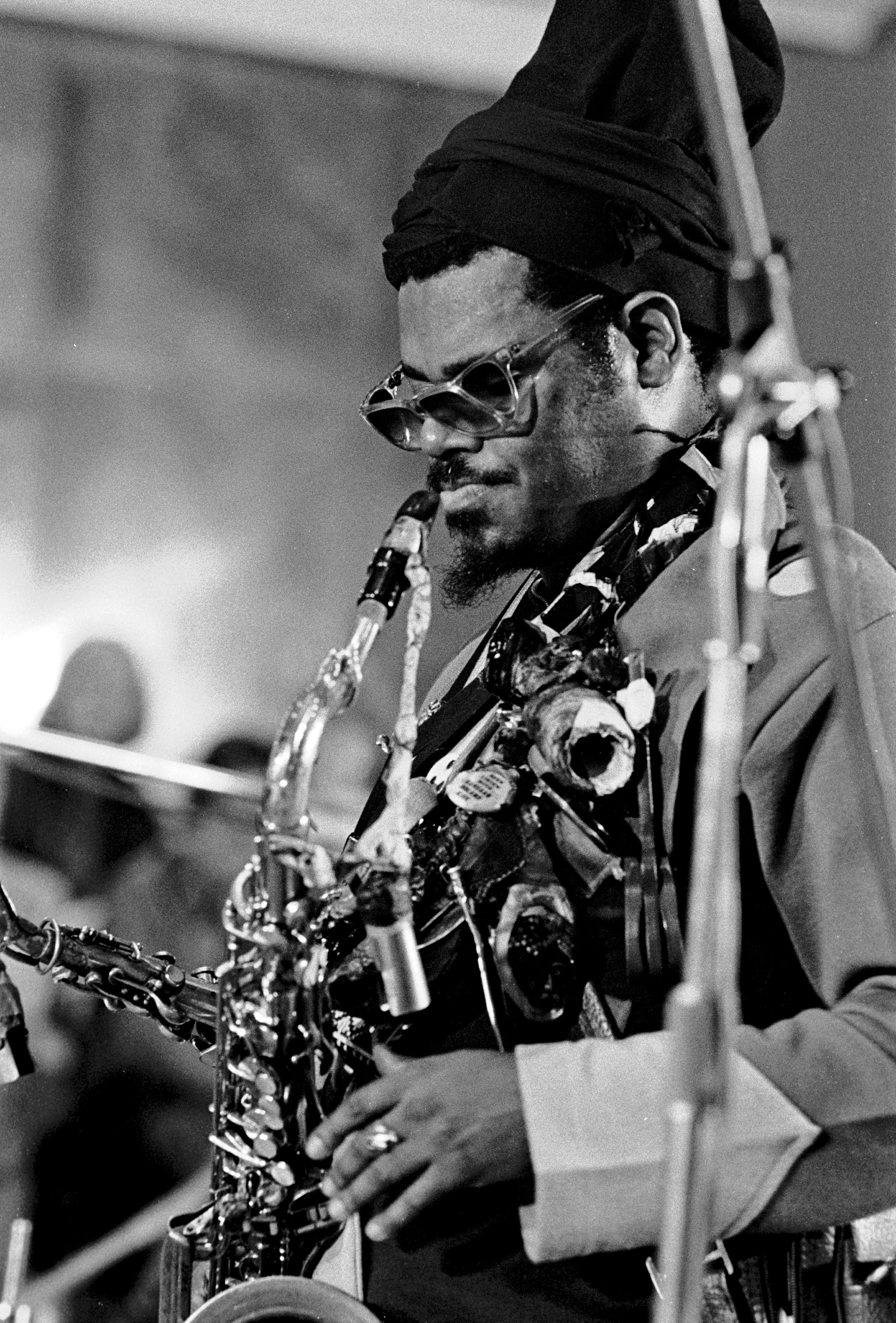 Roland Kirk, "Rahsan Roland Kirk" Live im Großen Sedesaal des NDR Hamburg, 1972